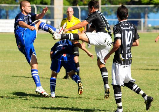 Campeonato Capixaba 2011: Veja a galeria de imagens de Vitória x Rio Branco - ht.ly/3MFoF - Fotos: Gabriel Lordêllo e Nestor Müller/A Gazeta